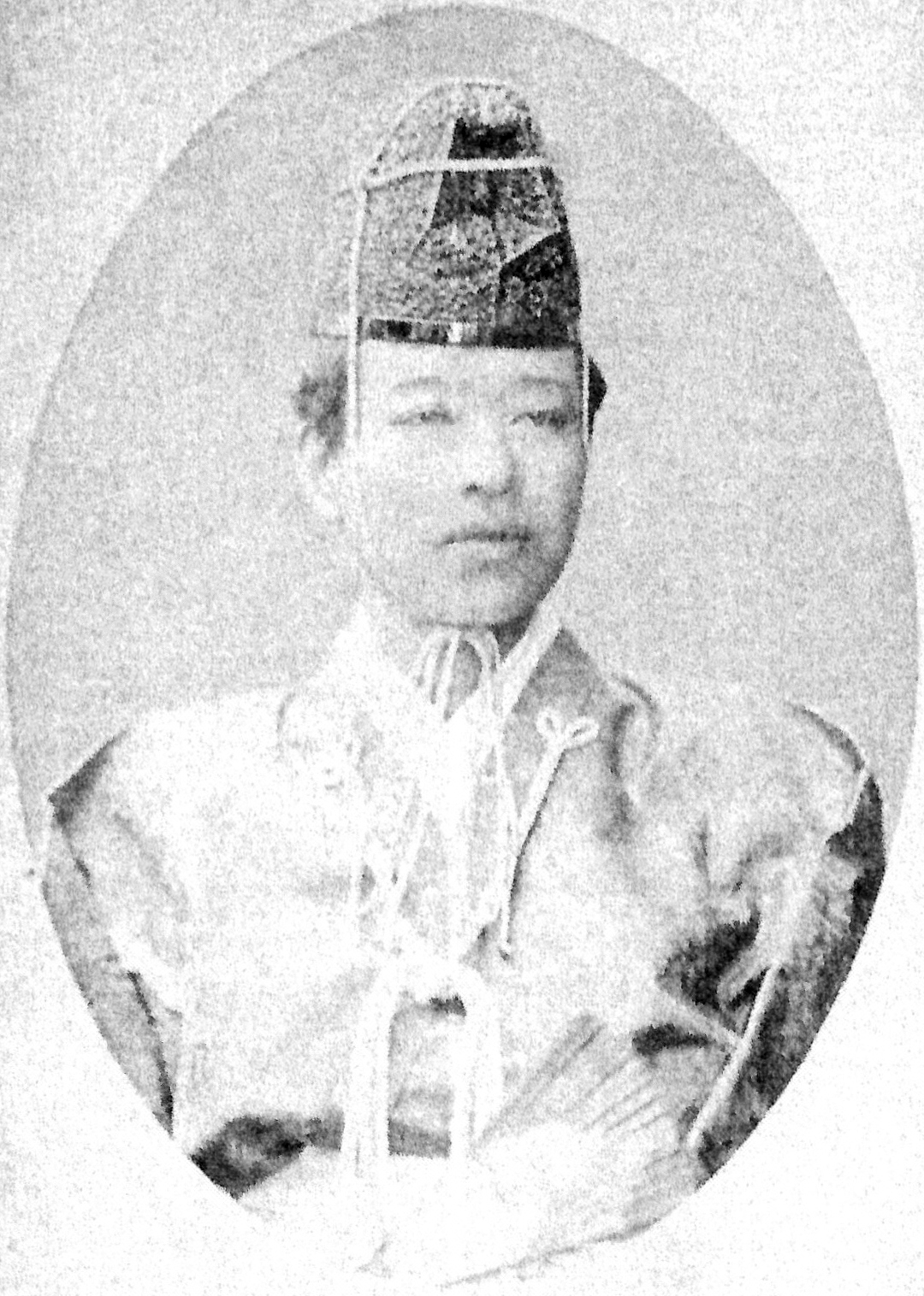 京極高富の肖像写真。